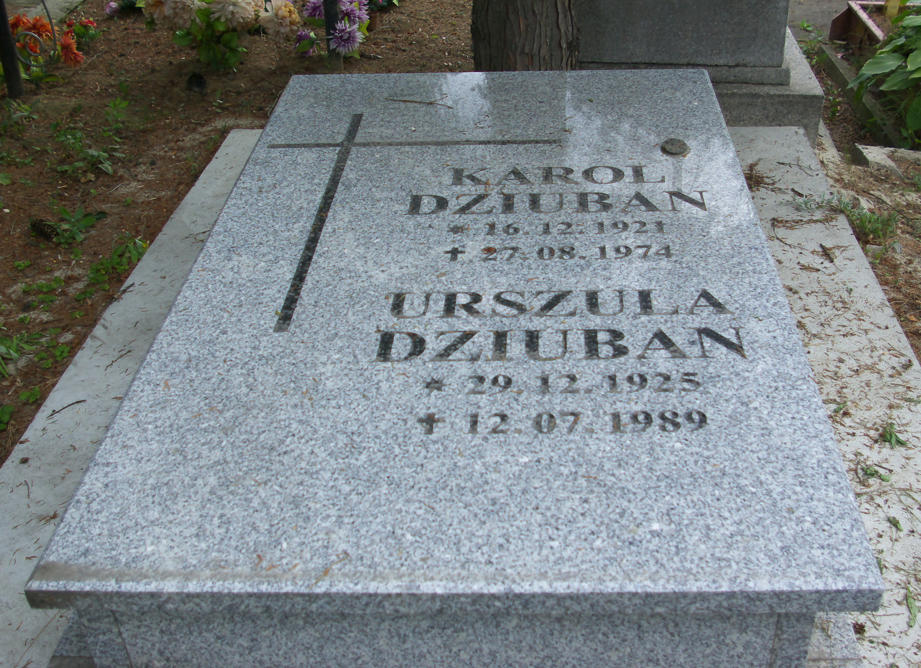 Grobowiec Karola i Urszuli Dziubanów na Cmentarzu Centralnym w Sanoku.